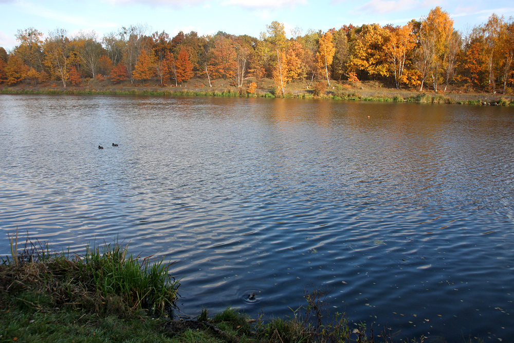 Kanał Żerański na wysokości ul. Krzyżówki.